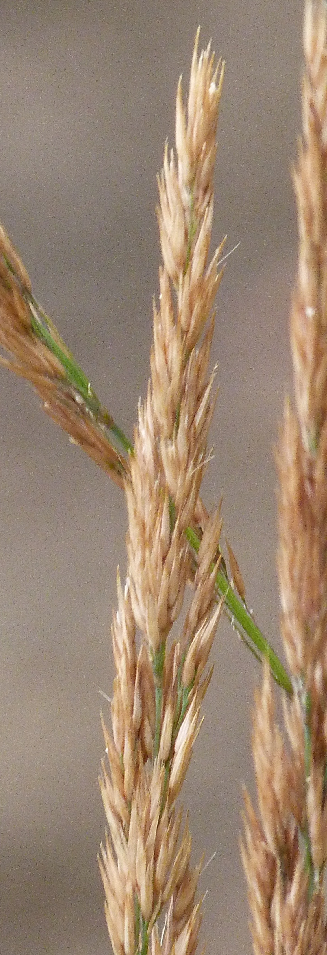 Calamagrostis x acutiflora